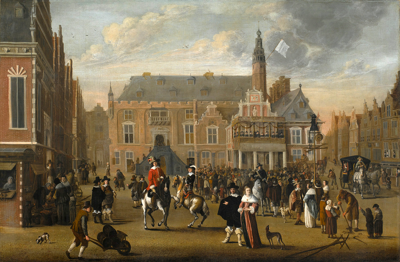 schilderij; geschiedenis (iconografie); Vrede van Münster; Haarlem